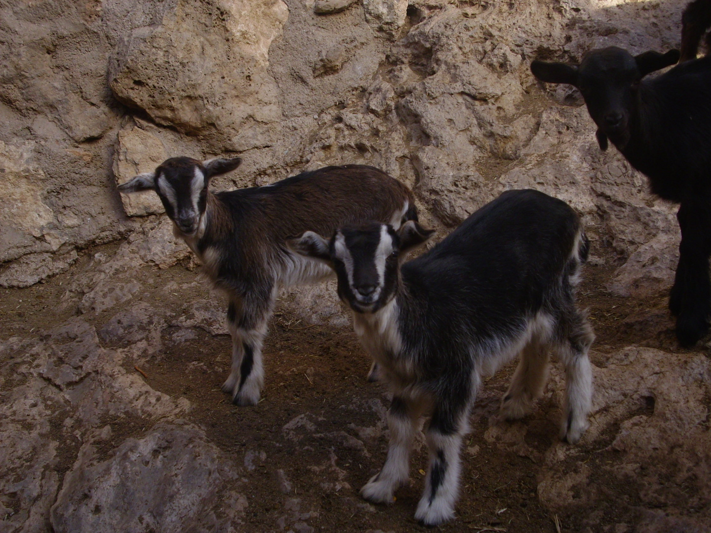 Cabritos de Capra hircus moncaina, subespecie propia del Moncayo, en peligro de extinción.